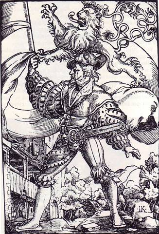 Praporschtschik mit dem Bohemia-Banner, der Fahne des tschechischen Königshofs im 16. Jahrhundert.